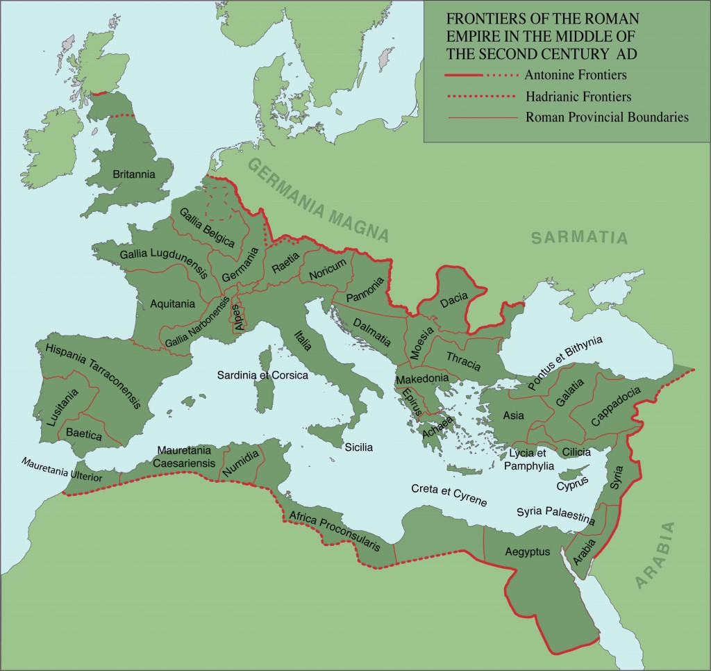 A Római Birodalom határai és provinciái